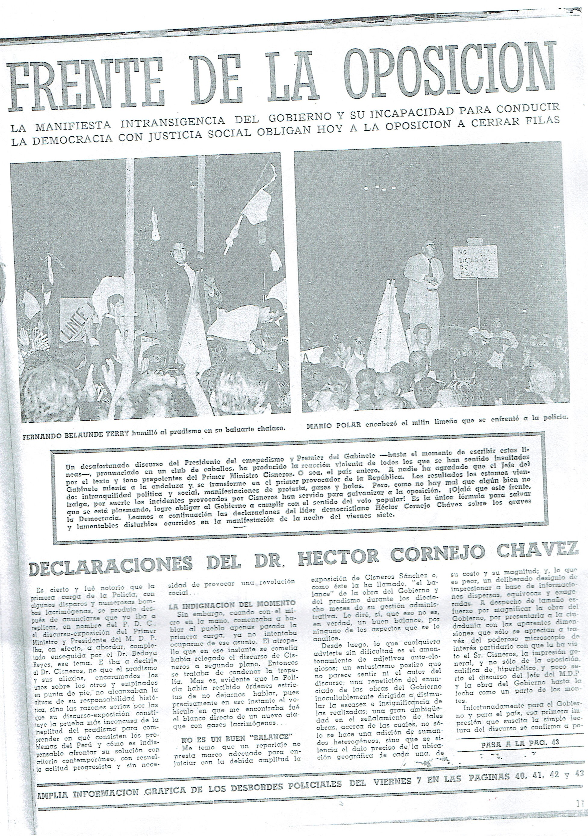 Columna tratando sobre mítin de Belaúnde y Mariano Polar, 1958